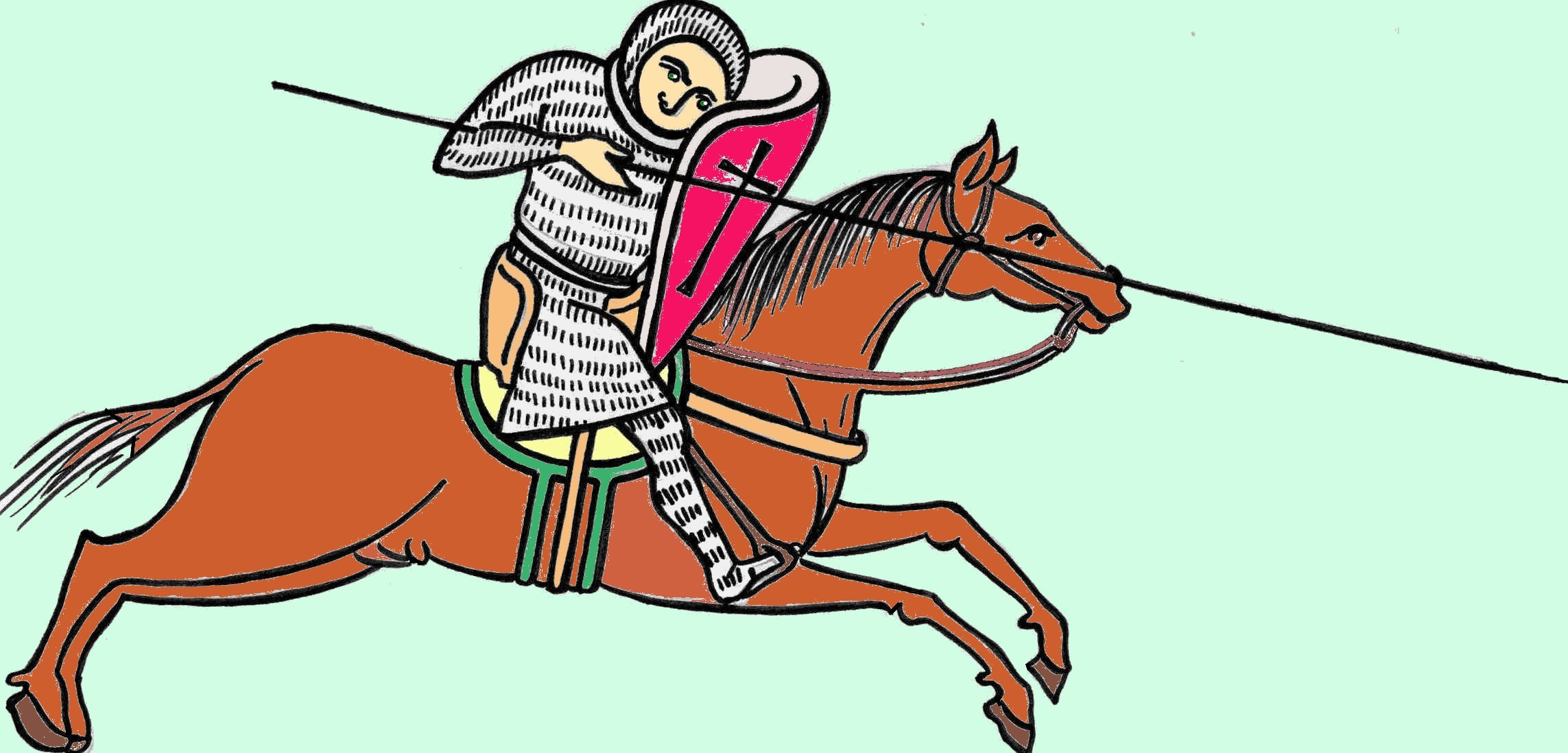 Càrrega d'un cavaller. Recreació d'una representació del noble anglo-normand Guillem el Mariscal.